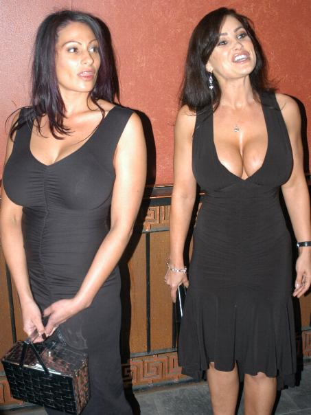 Ava Lauren and Lisa Ann at XRCO Awards 2007